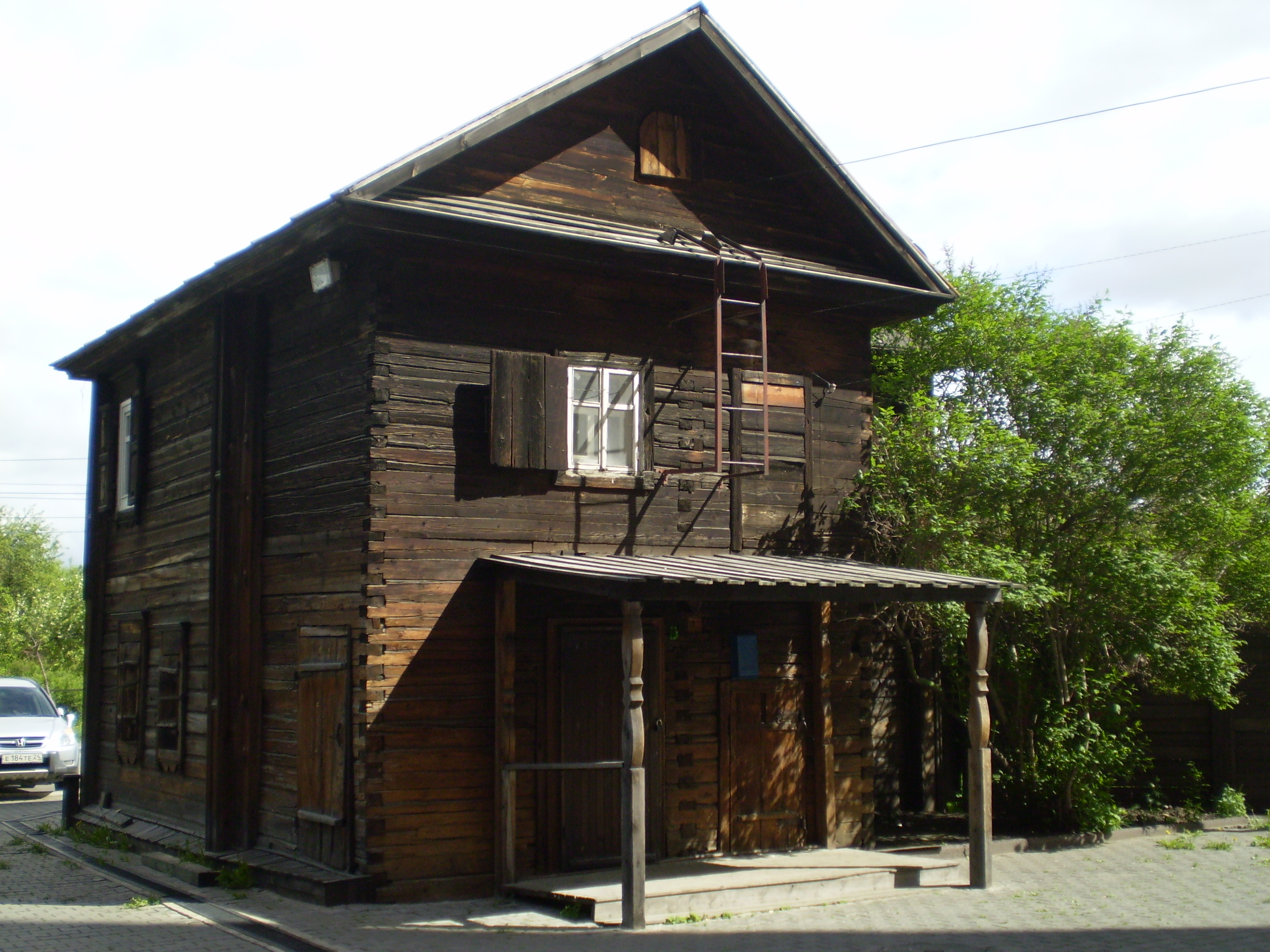 Дом, в котором в марте-апреле 1897 года Ленин В.И. часто занимался теоретической работой, живя по соседству в доме Поповой. Красноярск, ул. Марковского 27. Памятник архитектуры, середина XIX века